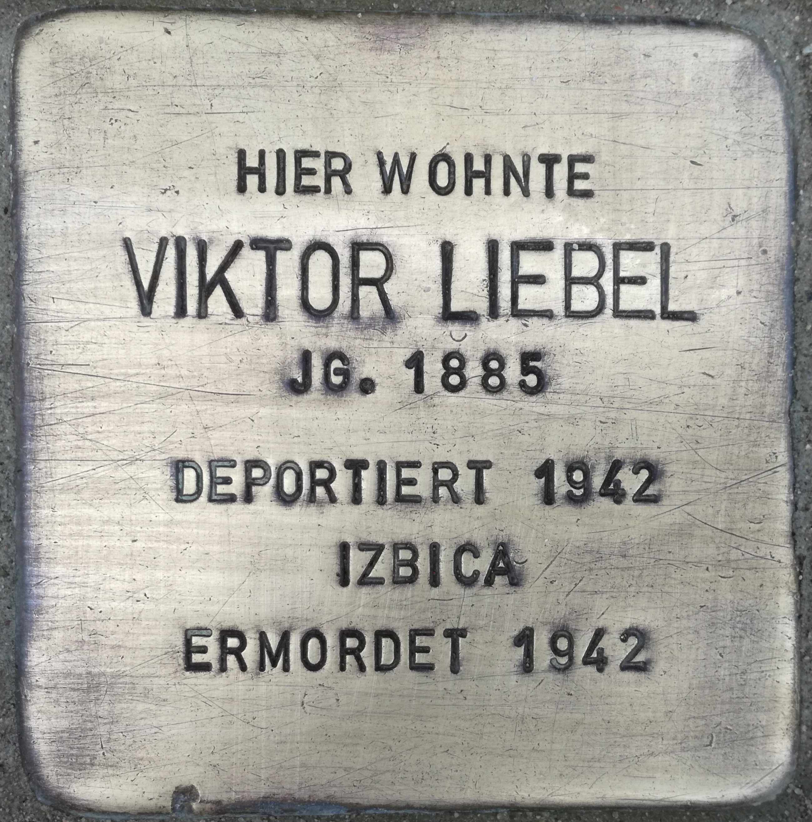 Hier wohnte Viktor Liebel Jahrgang 1885 deportiert 1942 Izbica ermordet 1942